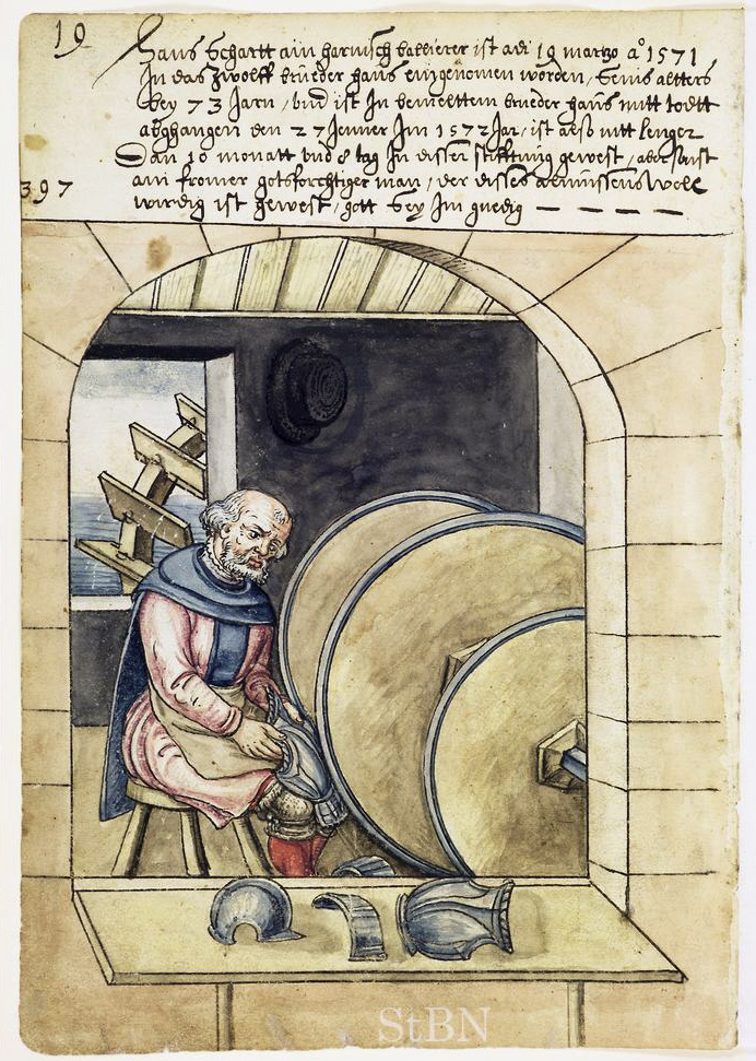 Hans Schartt (Schart; Schardt), harnisch ballierer (Harnischpolierer) Transkription und weitere Informationen